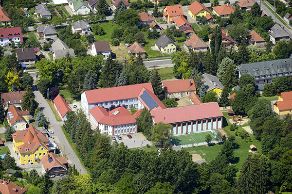 Szilvásvárad légi fotó